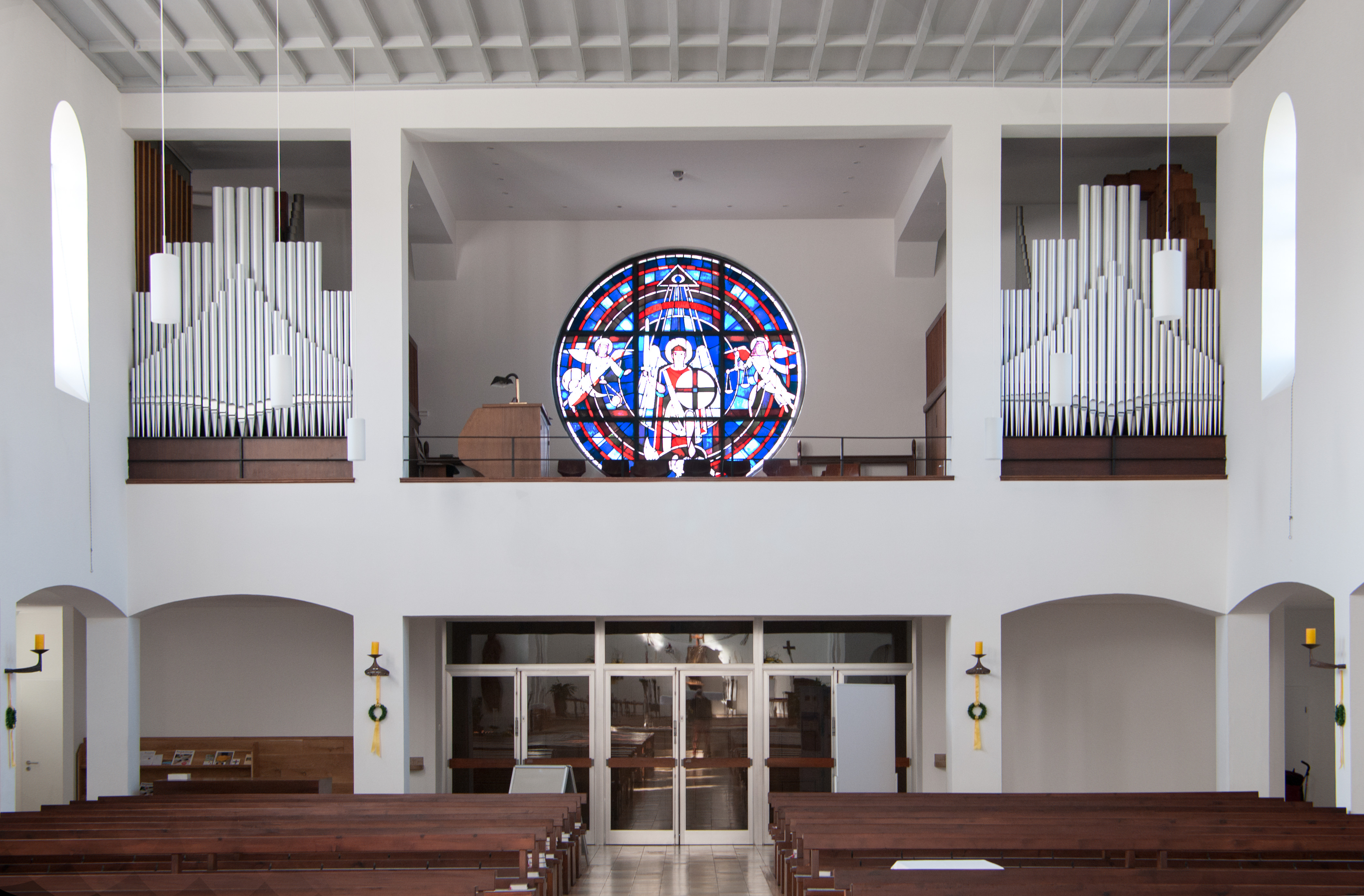 Empore mit Orgel und Glasfenster